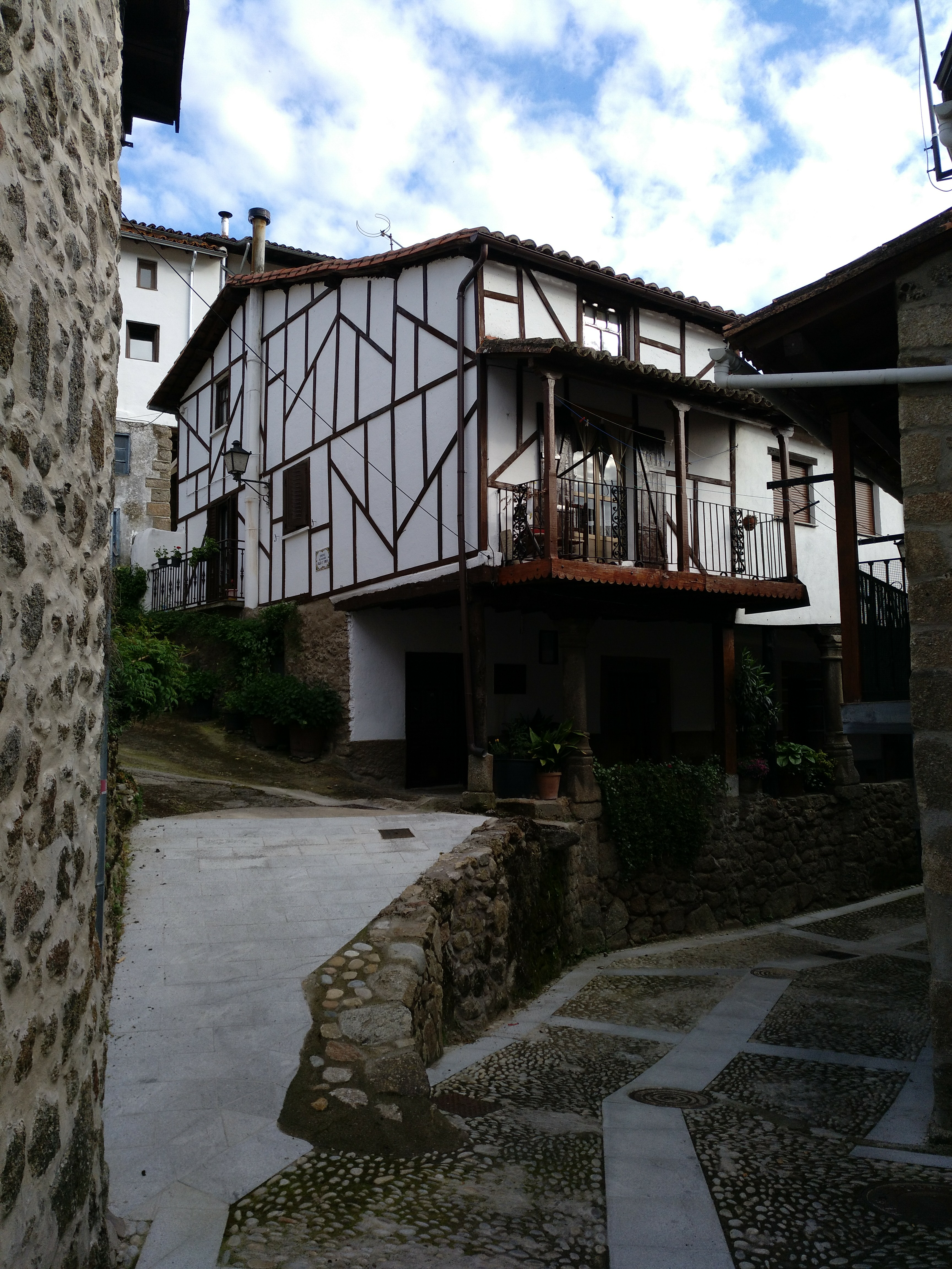 Calle de Montemayor del Río (Salamanca)